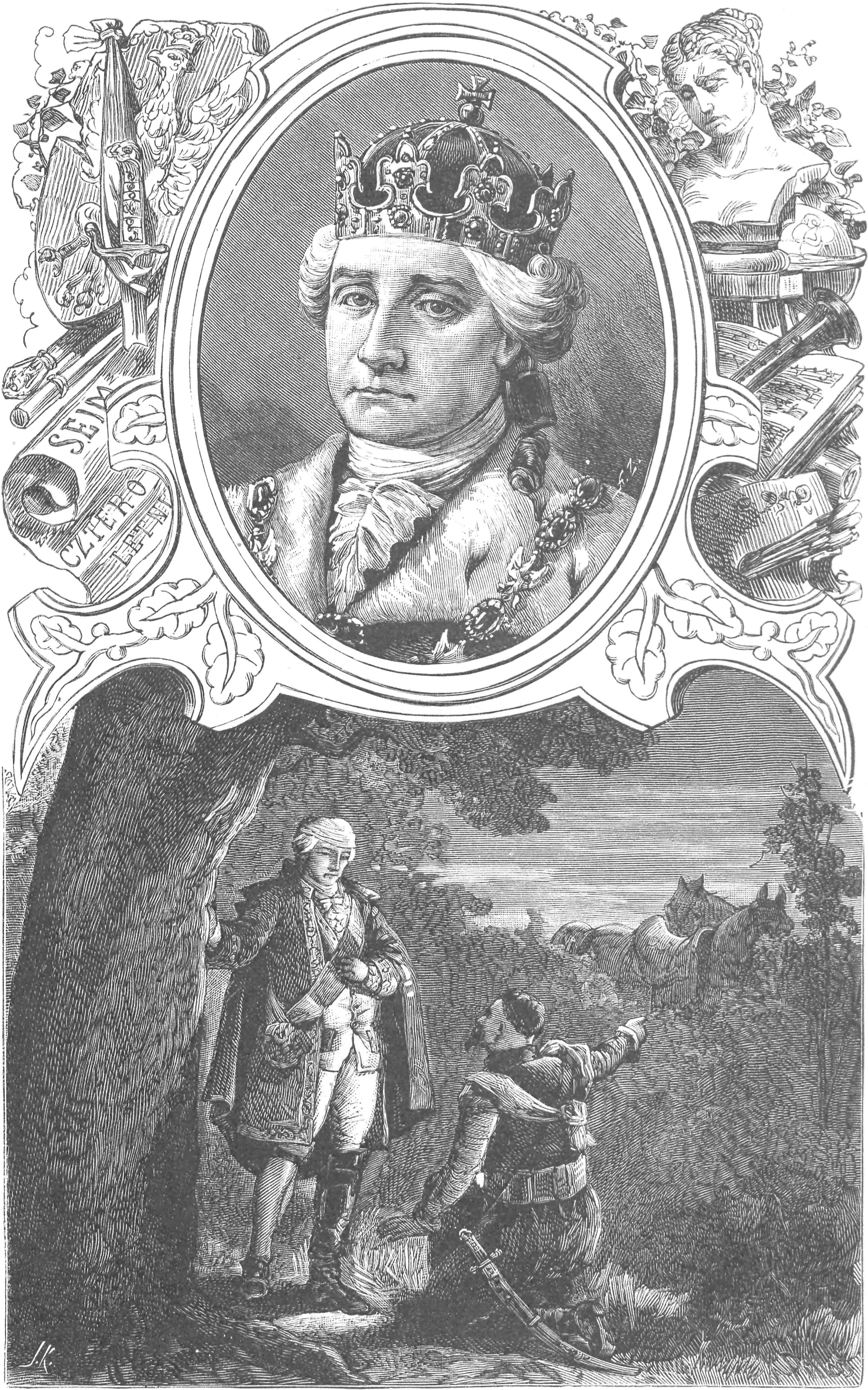 ilustracja z książki „Wizerunki książąt i królów polskich“